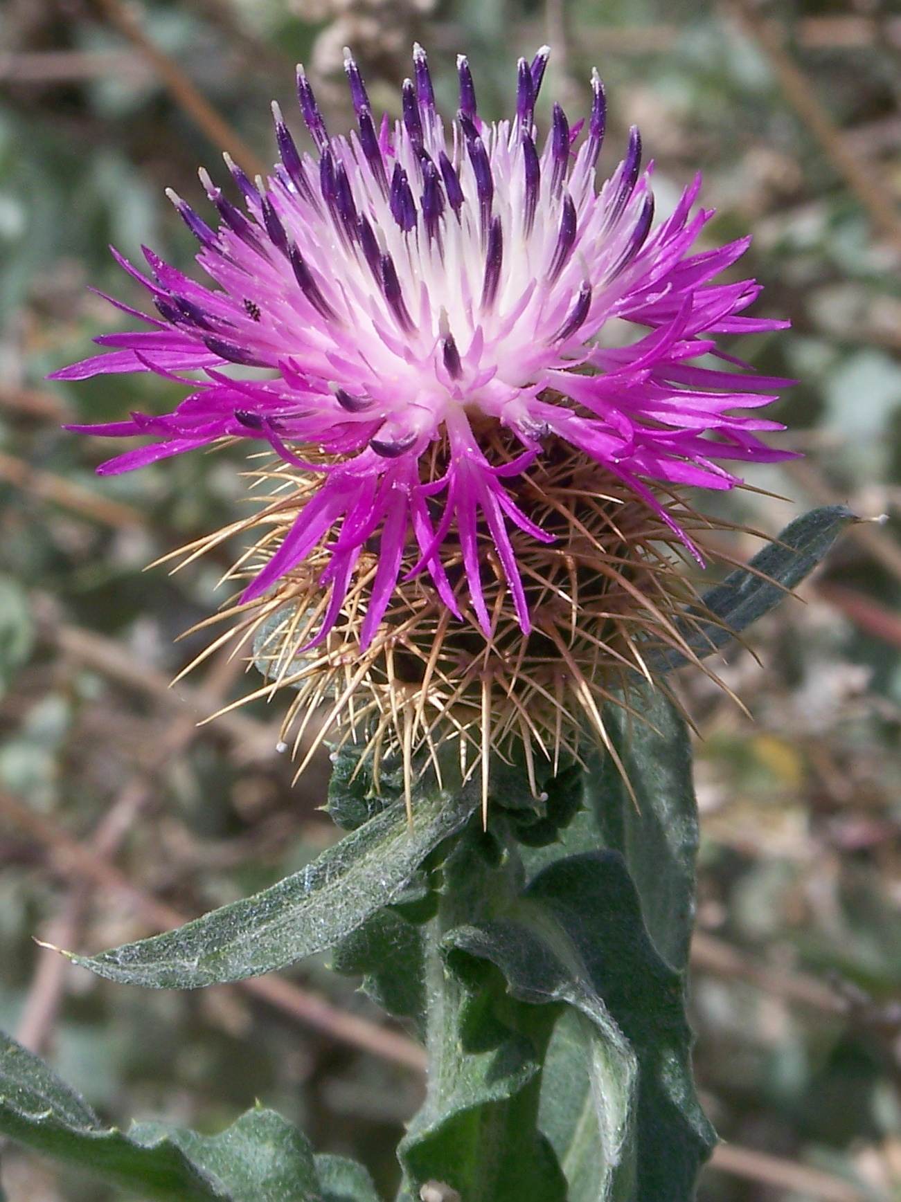 Centaurea seridis (Arzolla) : Capítulo en floración - Camino viejo de Alicante, Albatera (Alicante, España).